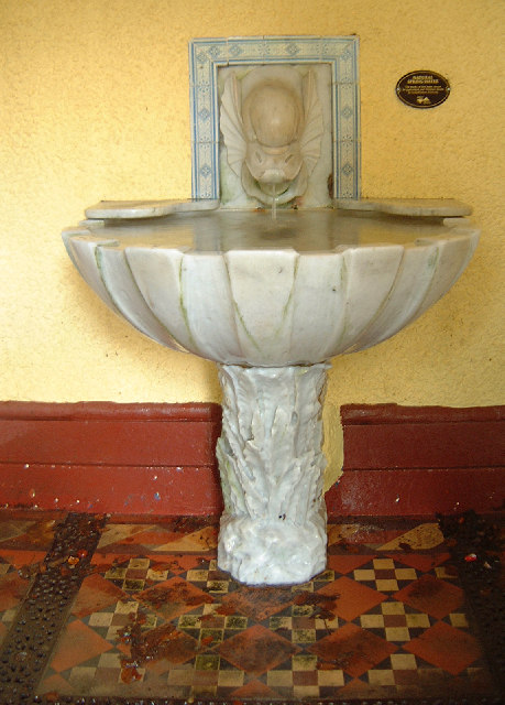 St Annes Well